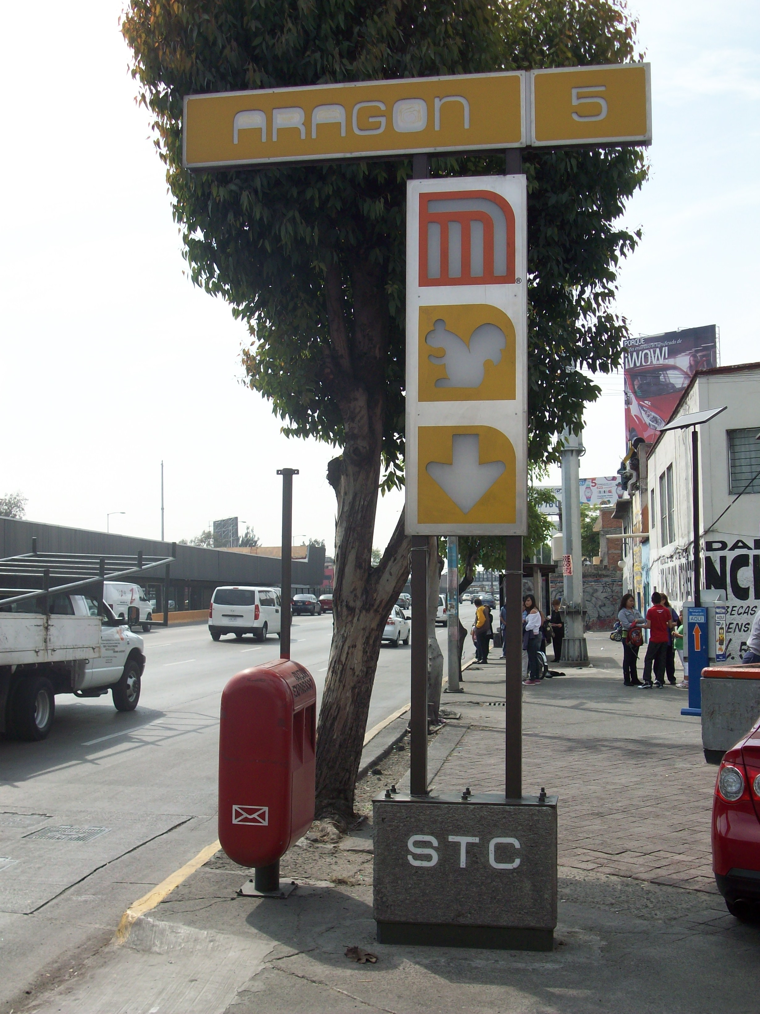 Estela de la estacion Aragon